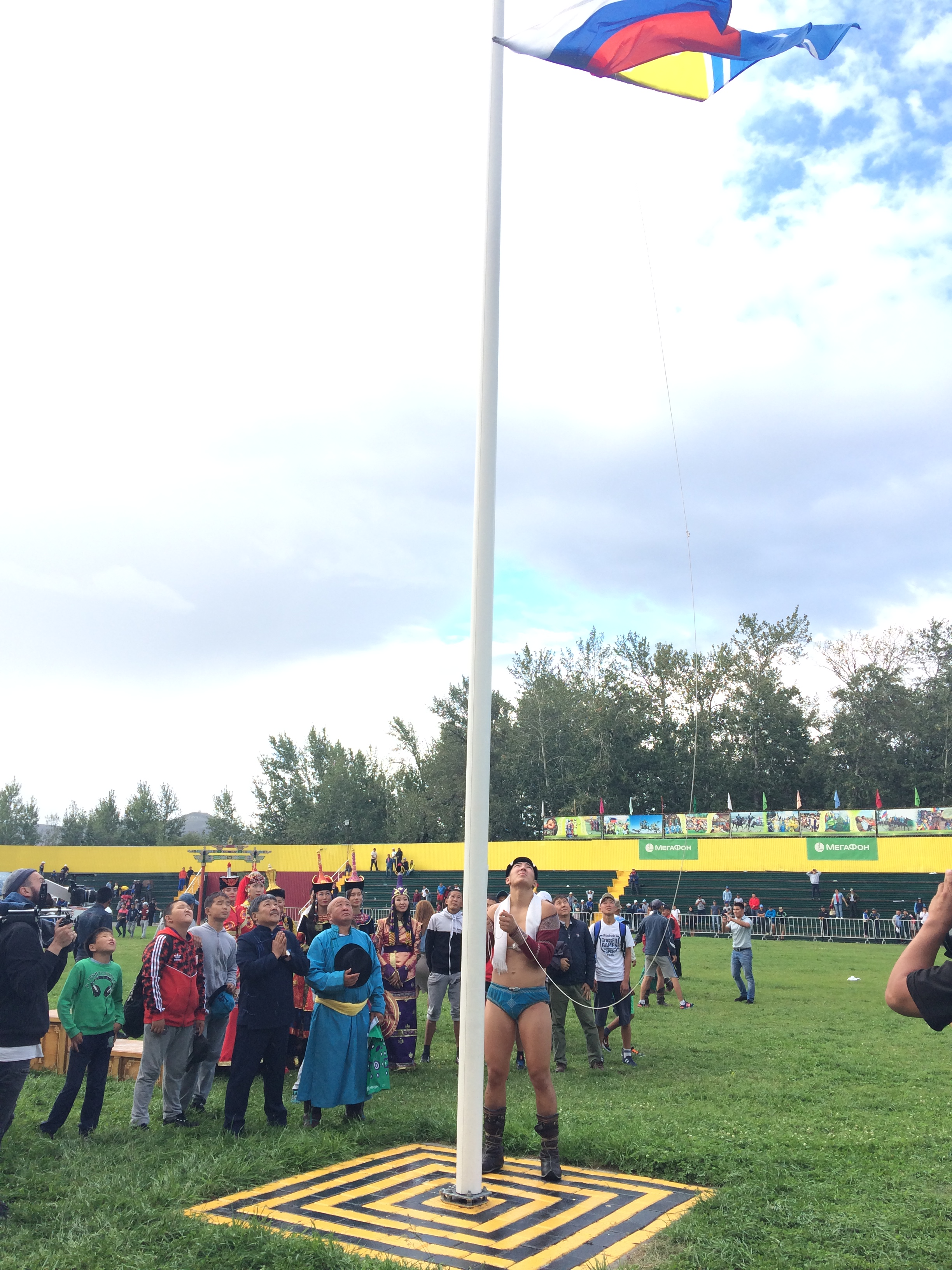 Торжественный спуск флагов. 13 августа 2016 Тыва дыл: Күрүне туктарын бадырары. Аныяктар аразынга Наадым Хүрежи. 2016ч 8а 13х.